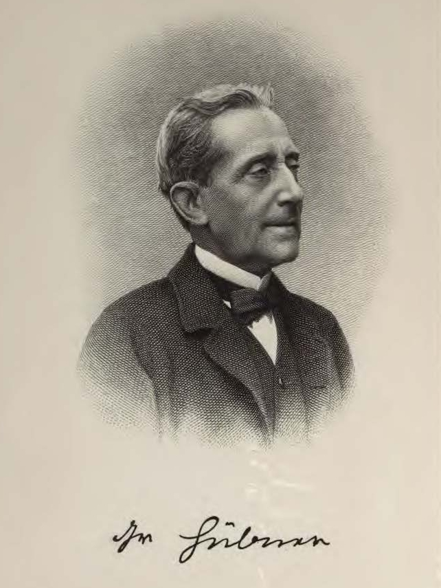 Portrait von Alexander Graf von Hübner, aus seinem Reisebericht »Ein Spaziergang um die Welt«, 7. Auflage, Leipzig 1891